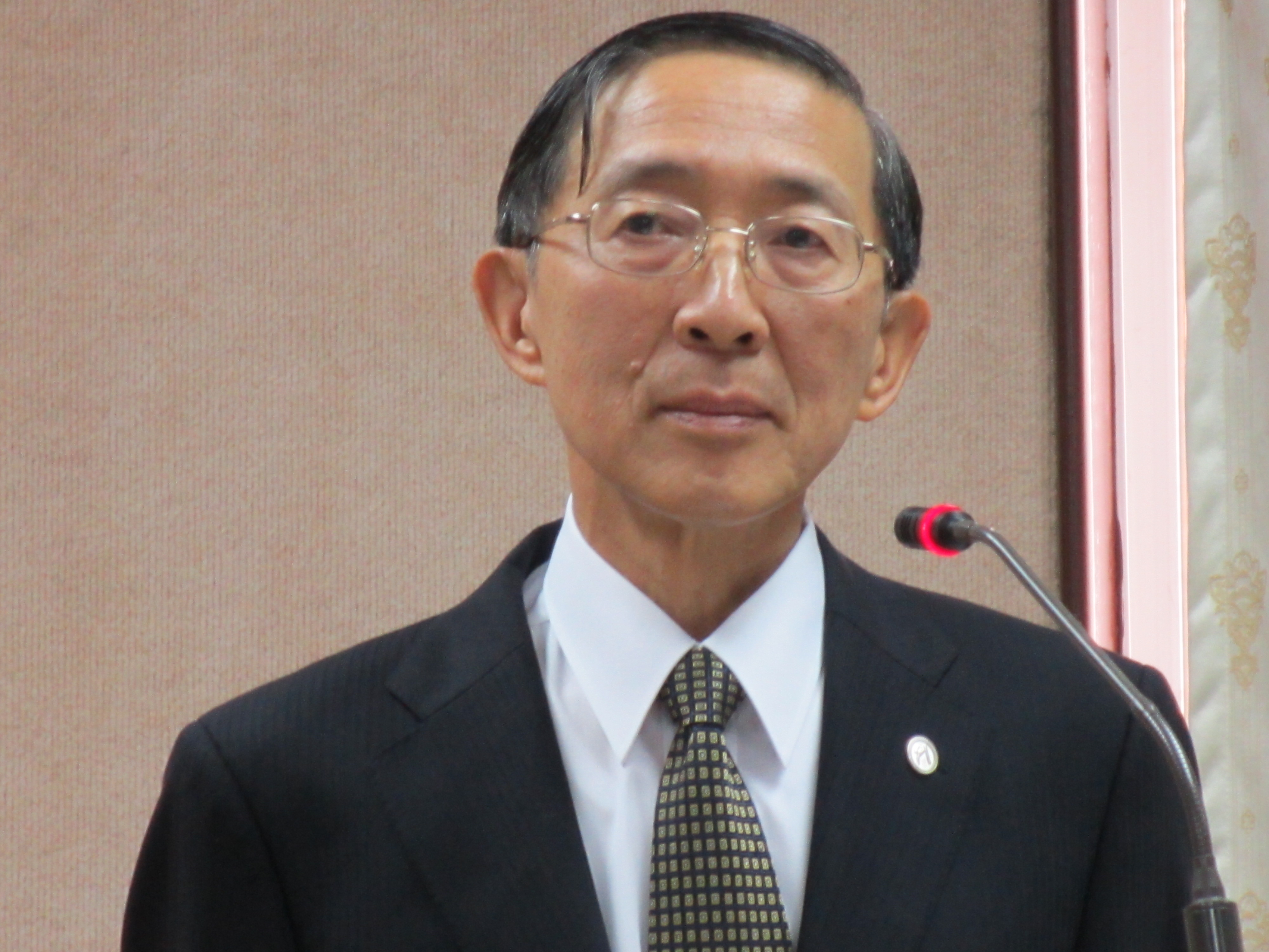 台湾外长 林永乐( 美国之音 张永泰拍摄）